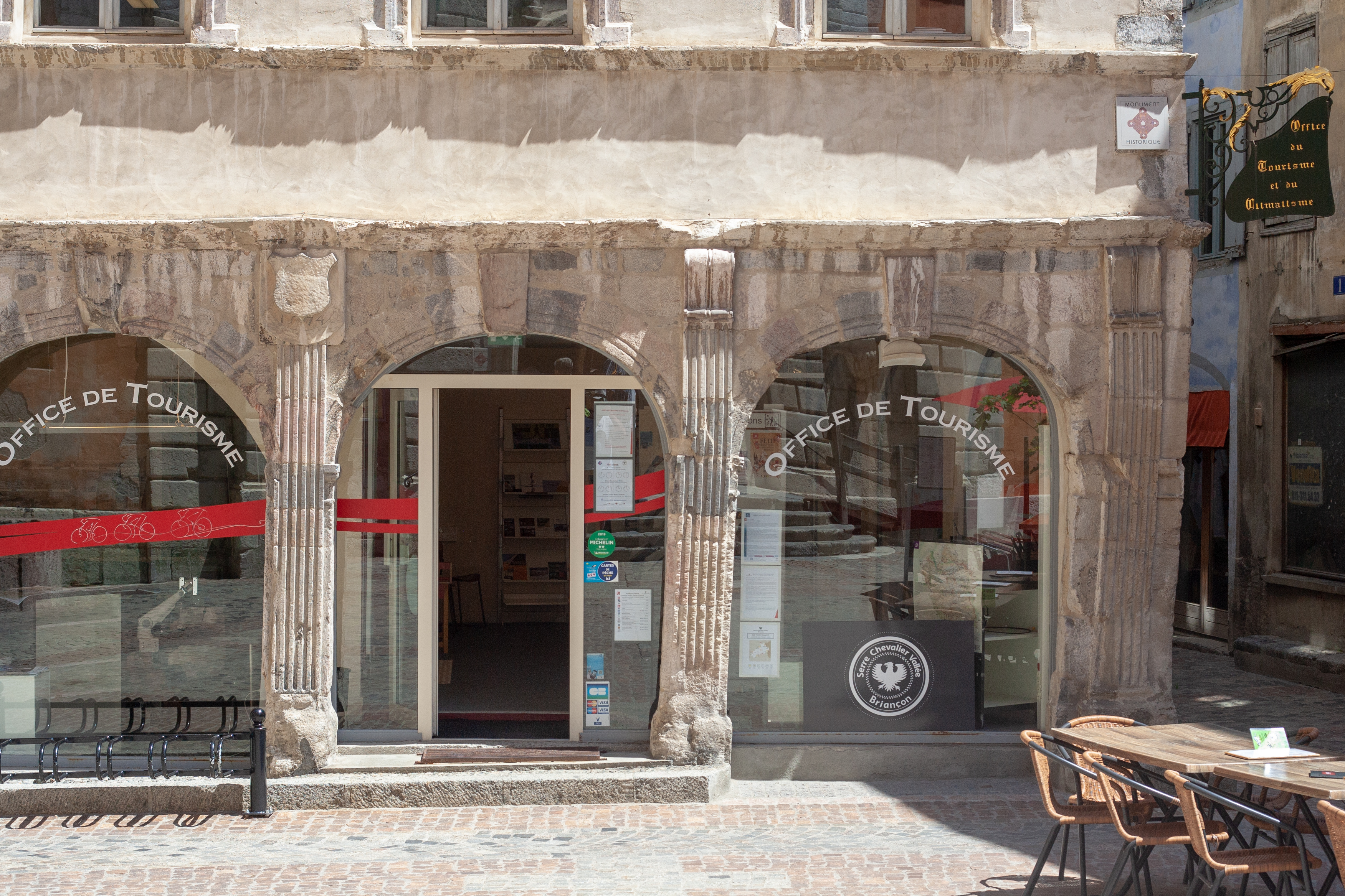 Office de tourisme